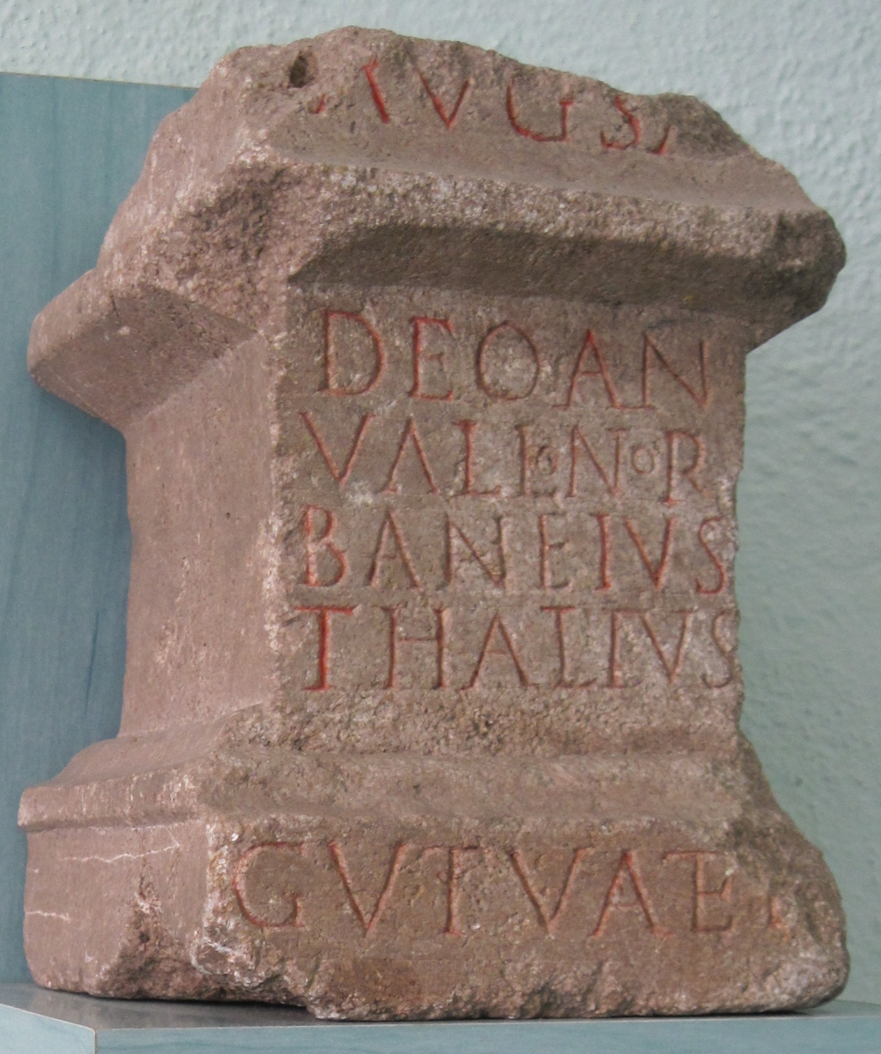 Autel en calcaire dédié au dieu Anvallus par Norbaneius Thallus, le gutuater. L'autel a été découvert en 1900 lors des travaux à la Gare d'Autun. Inv. M.L. 1570. CAG 71/1 Autun, p. 78